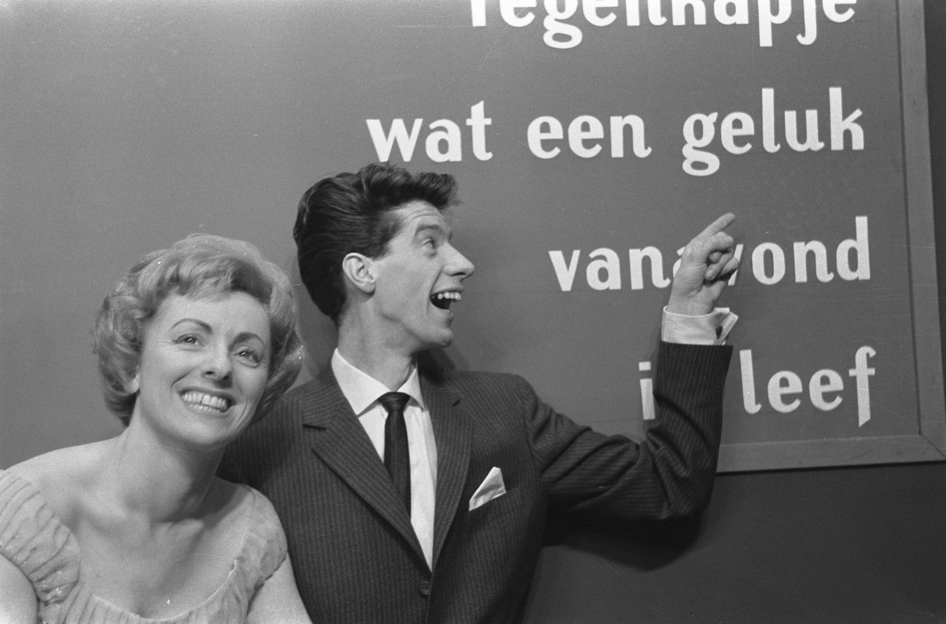 Collectie / Archief : Fotocollectie Anefo Reportage / Serie : [ onbekend ] Beschrijving : Finale van het Nationaal Songfestival 1960 in Hilversum, Rudy Carrell en Annie Palmen Datum : 9 februari 1960 Locatie : Hilversum Trefwoorden : artiesten, muziek, songfestivals Persoonsnaam : Carrell Rudy, Palmen, Annie Fotograaf : Pot, Harry / Anefo Auteursrechthebbende : Nationaal Archief Materiaalsoort : Negatief (zwart/wit) Nummer archiefinventaris : bekijk toegang 2.24.01.05 Bestanddeelnummer : 911-0162